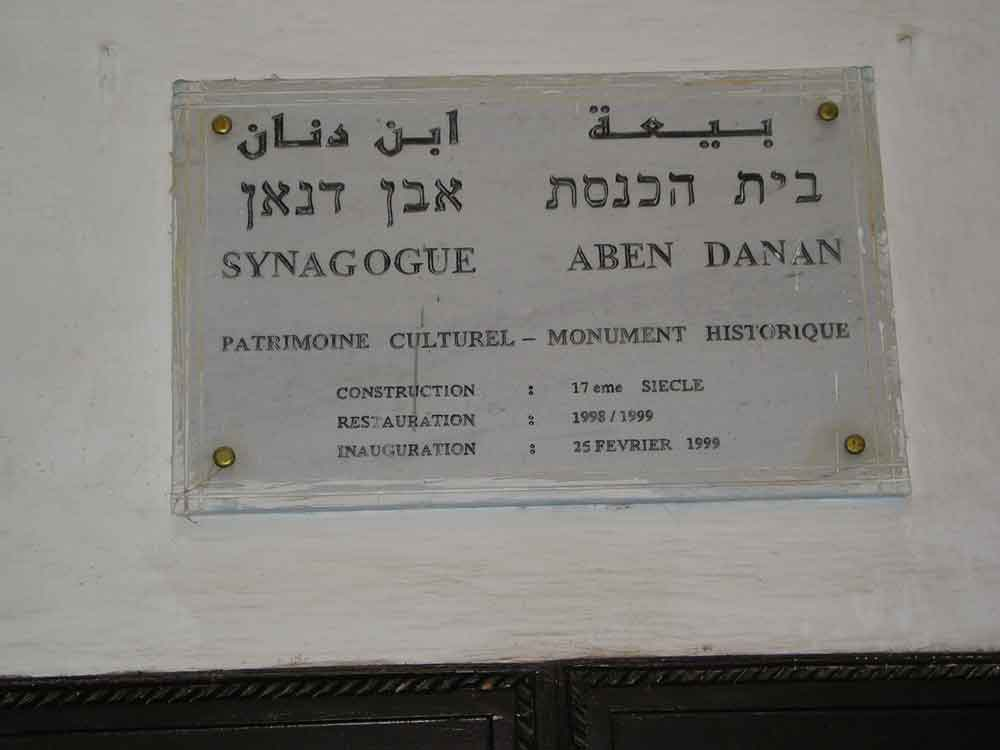 synaguogue abendanan